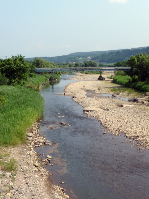 熊沢川